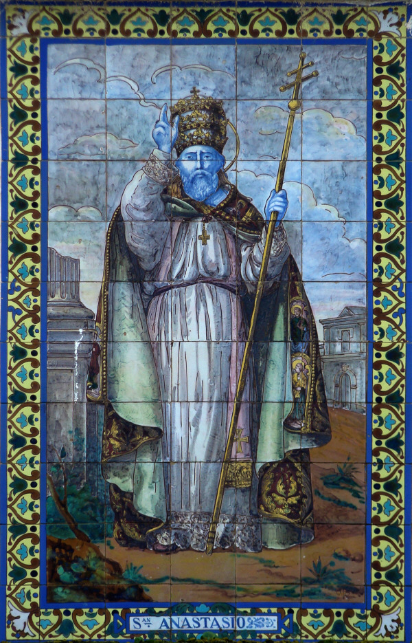 Retablo cerámico con San Anastasio I, papa, en la fachada principal de la Iglesia del antiguo Colegio de Santa Catalina, Compañía de Jesús (Calle Compañía, 27) Trigueros. Huelva., obra de Rodríguez